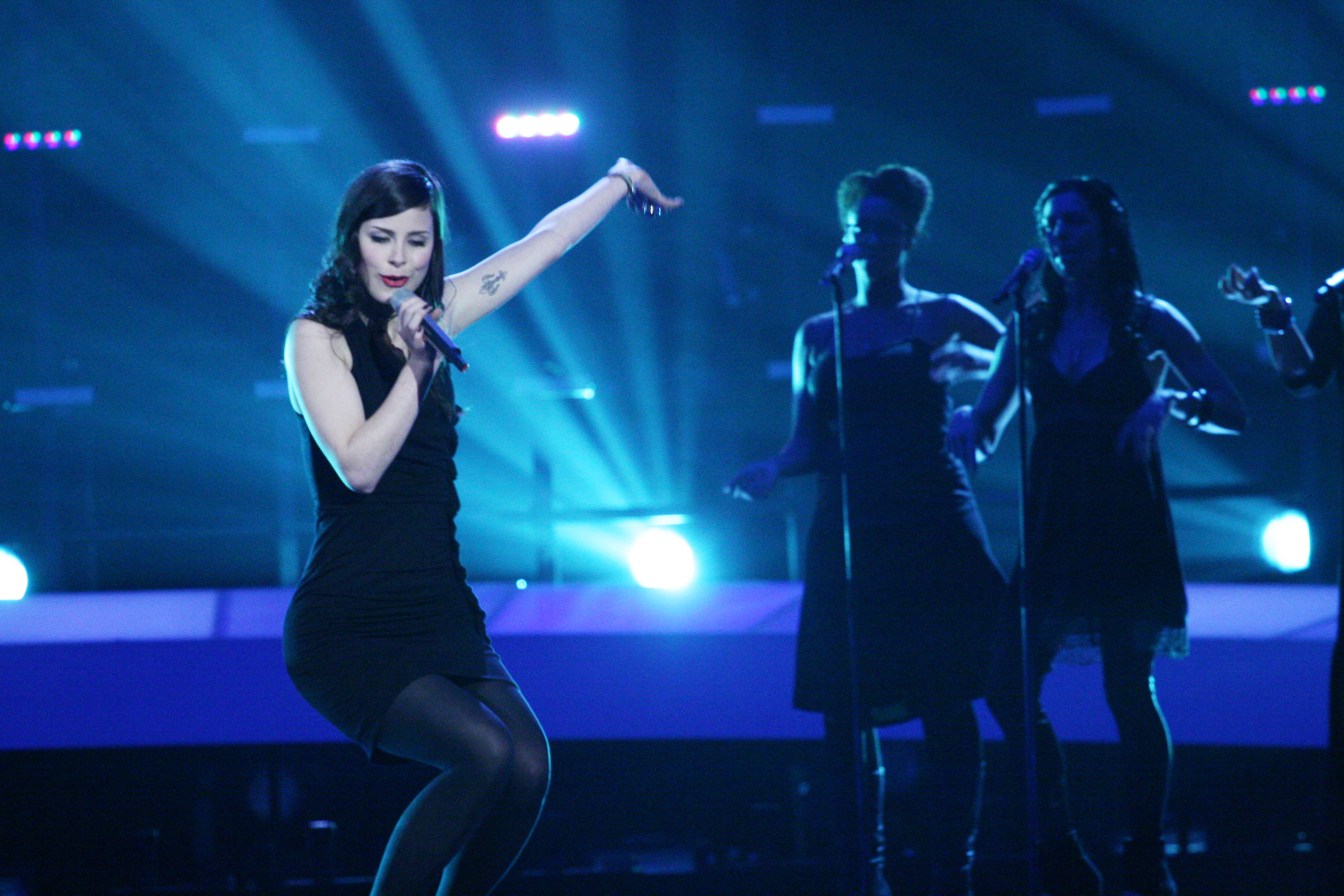 Fra generalprøve til finalen i Melodi Grand Prix / Eurovision Song Contest Oslo 2010 i Telenor Arena 28. mai. Foto: Erik F. Brandsborg